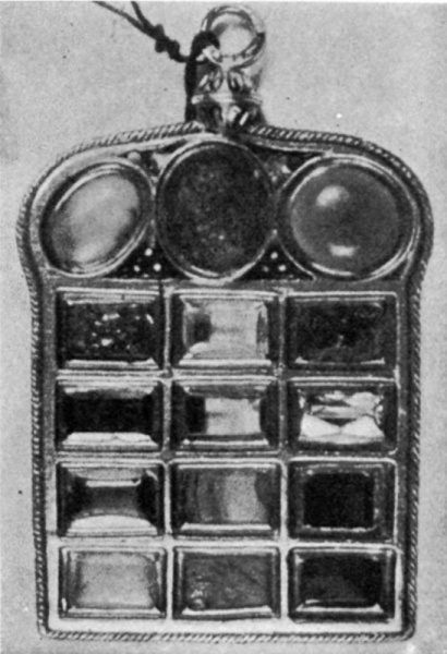 Nachbildung des Hohepriesterschildes: 12 bunte Steine und Halbedelsteine, davon 2 als Gemmen geschnitten, darüber Türkis, Saphir, Sardonyx. Goldene Fassung mit blauemailliertem Rand. Aus der landgräfl. Kunstkammer, 17. Jh. Hess. Landesmuseum